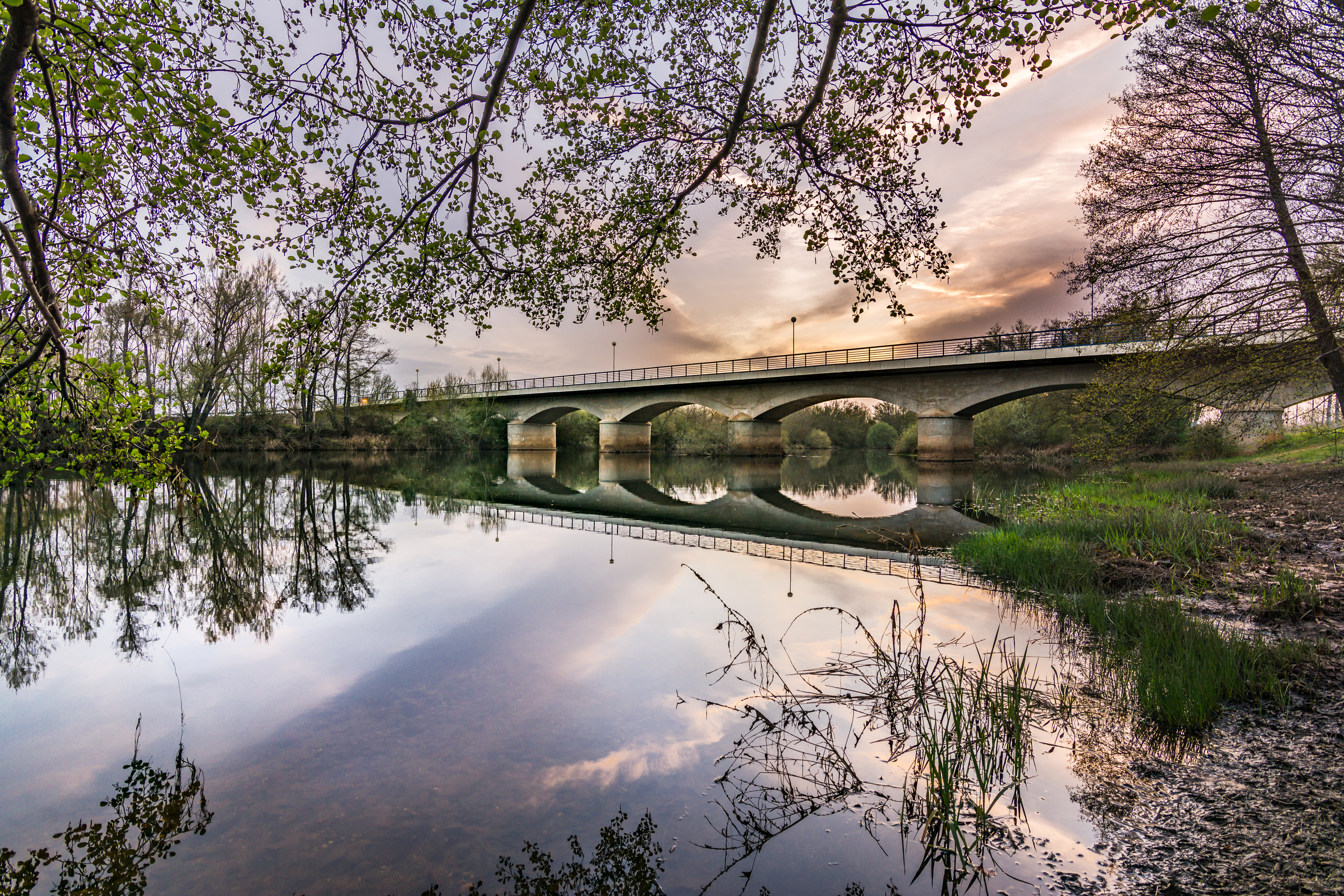 Lagunas de Tera y Vidriales This is a photography of a Special Area of Conservation in Spain with the ID: ES4190134. Natura2000 entry, EEA entry